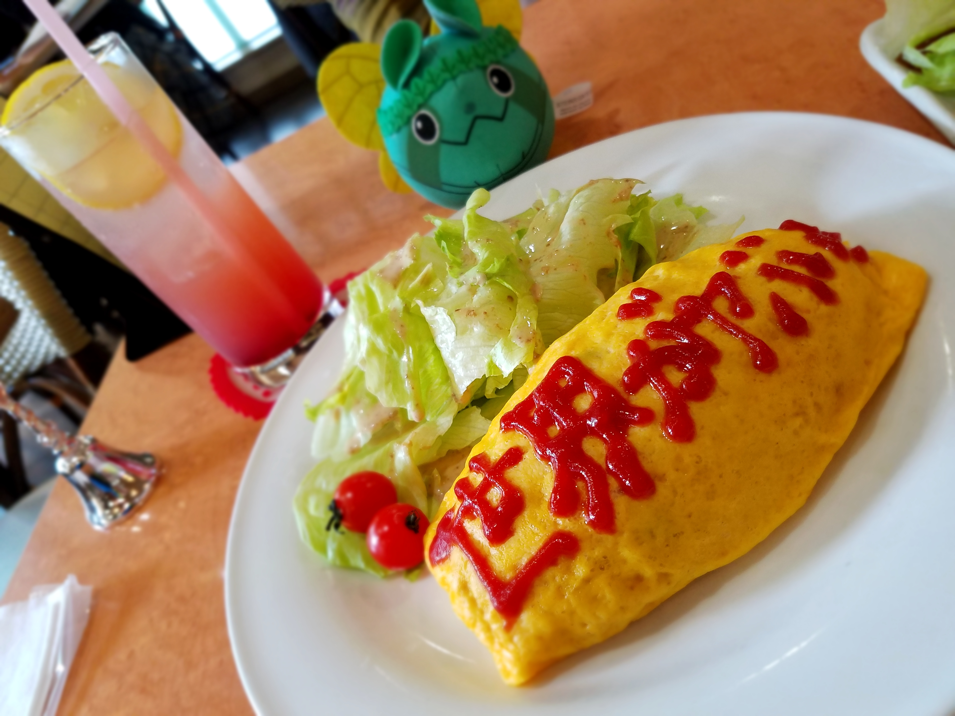 エル・プサイ・コンガリィ "Steins; Gate" Pilgrimage around Akihabara